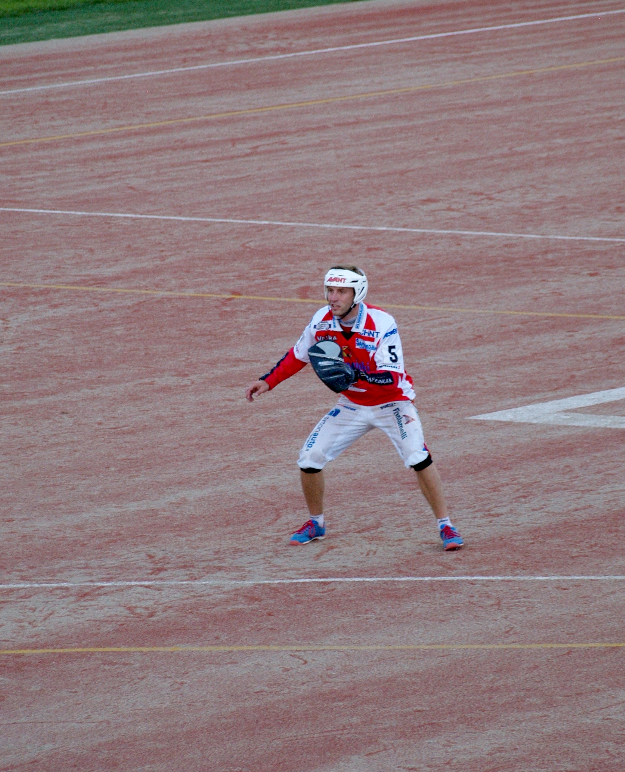 Vimpelin Veto - Koskenkorvan Urheilijat pesäpallo-ottelu 1.8.2014. Kuvassa Janne Leppälä.